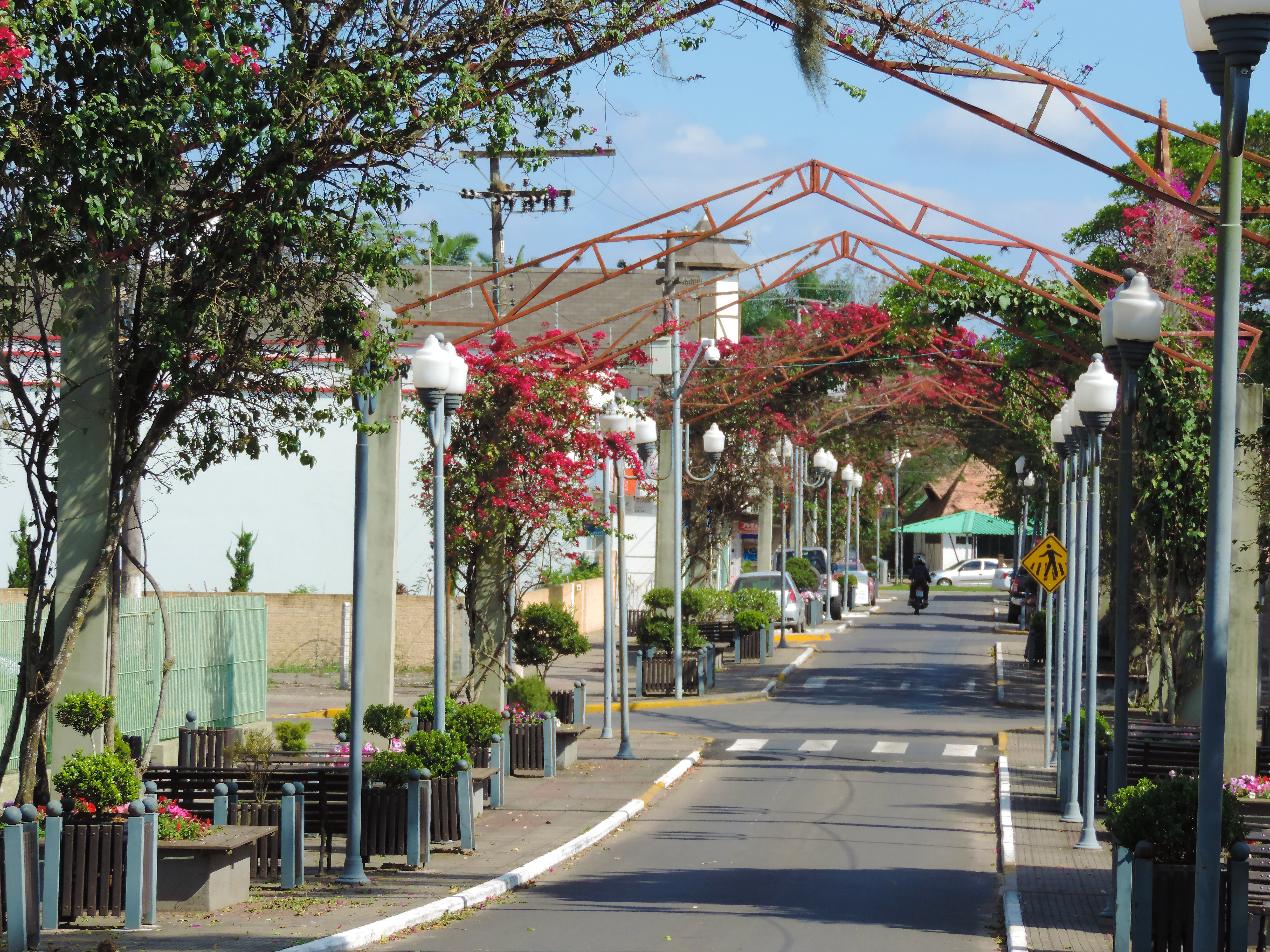 Esta maravilhosa rua de arcos embelezados com as flores Buganvília leva o nome de um dos primeiros colonizadores de Forquilhinha, João José Back, família descendentes dos imigrantes provenientes da região de Briedel, Alemanha. João José Back casado com Isabela Westrup adquiriram as primeiras terras onde mais tarde fixaram residência.